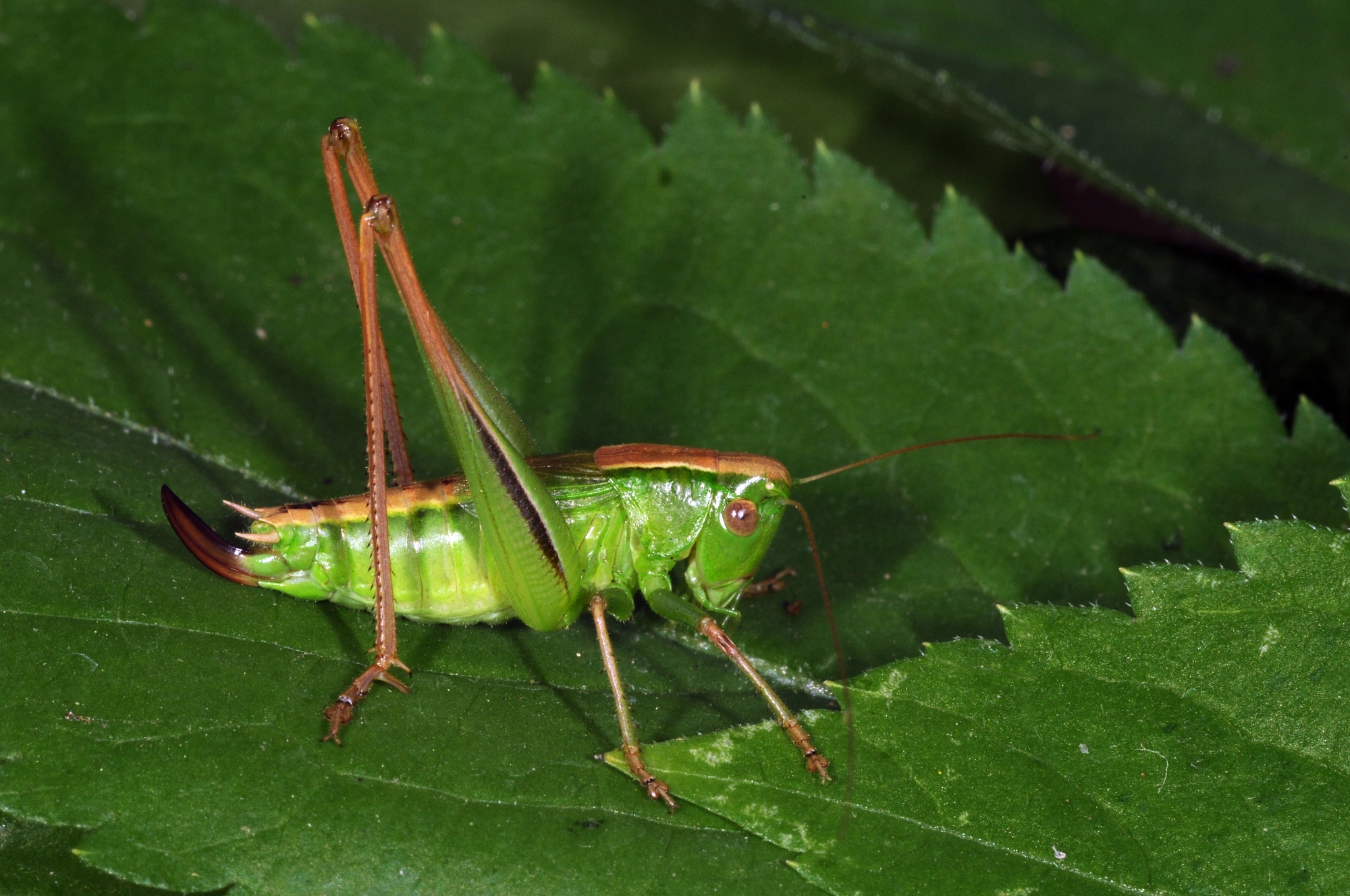 Metrioptera bicolor, Weibchen, Mainzer Sand, Rheinland-Pfalz, Deutschland